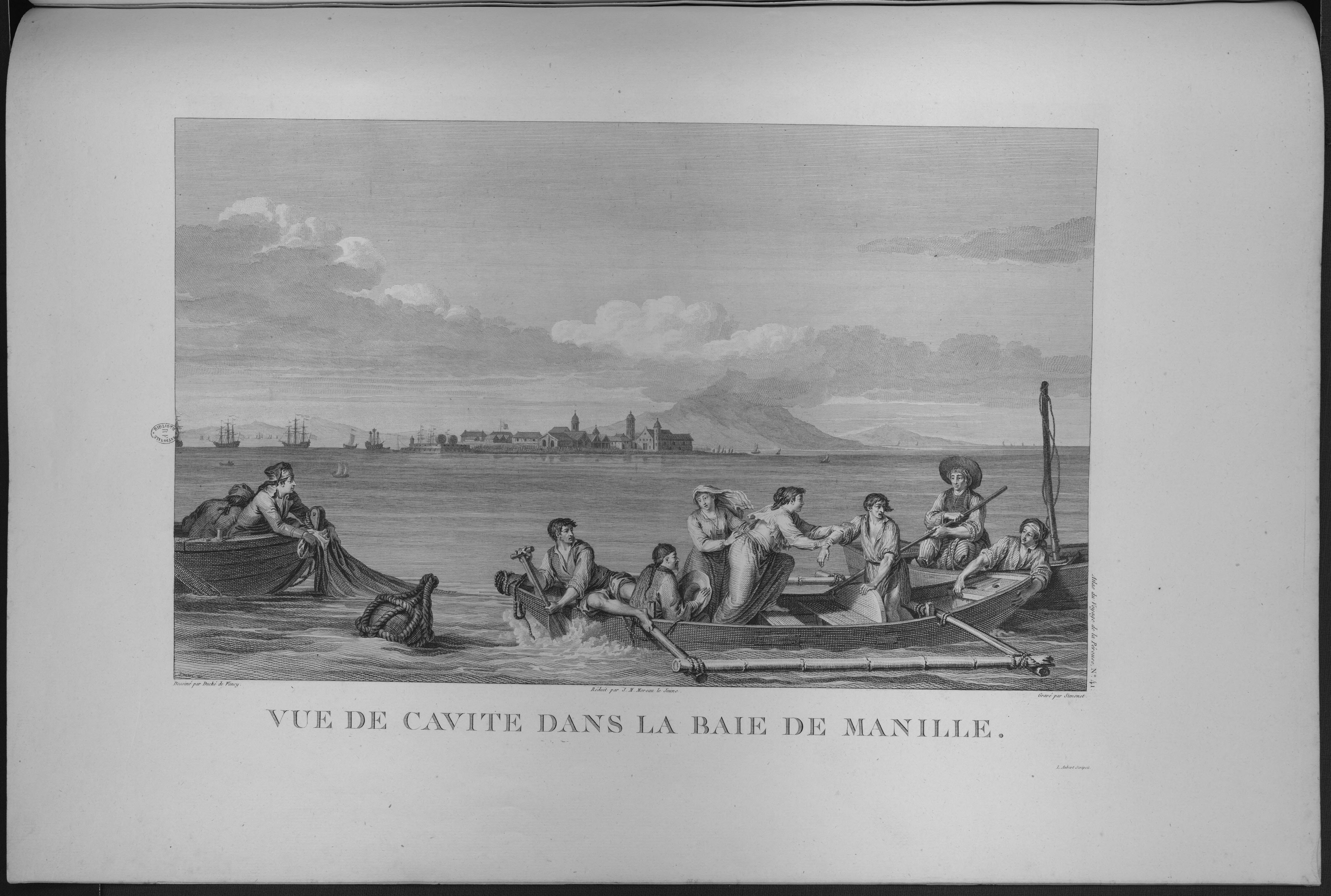 Atlas du voyage de La Pérouse